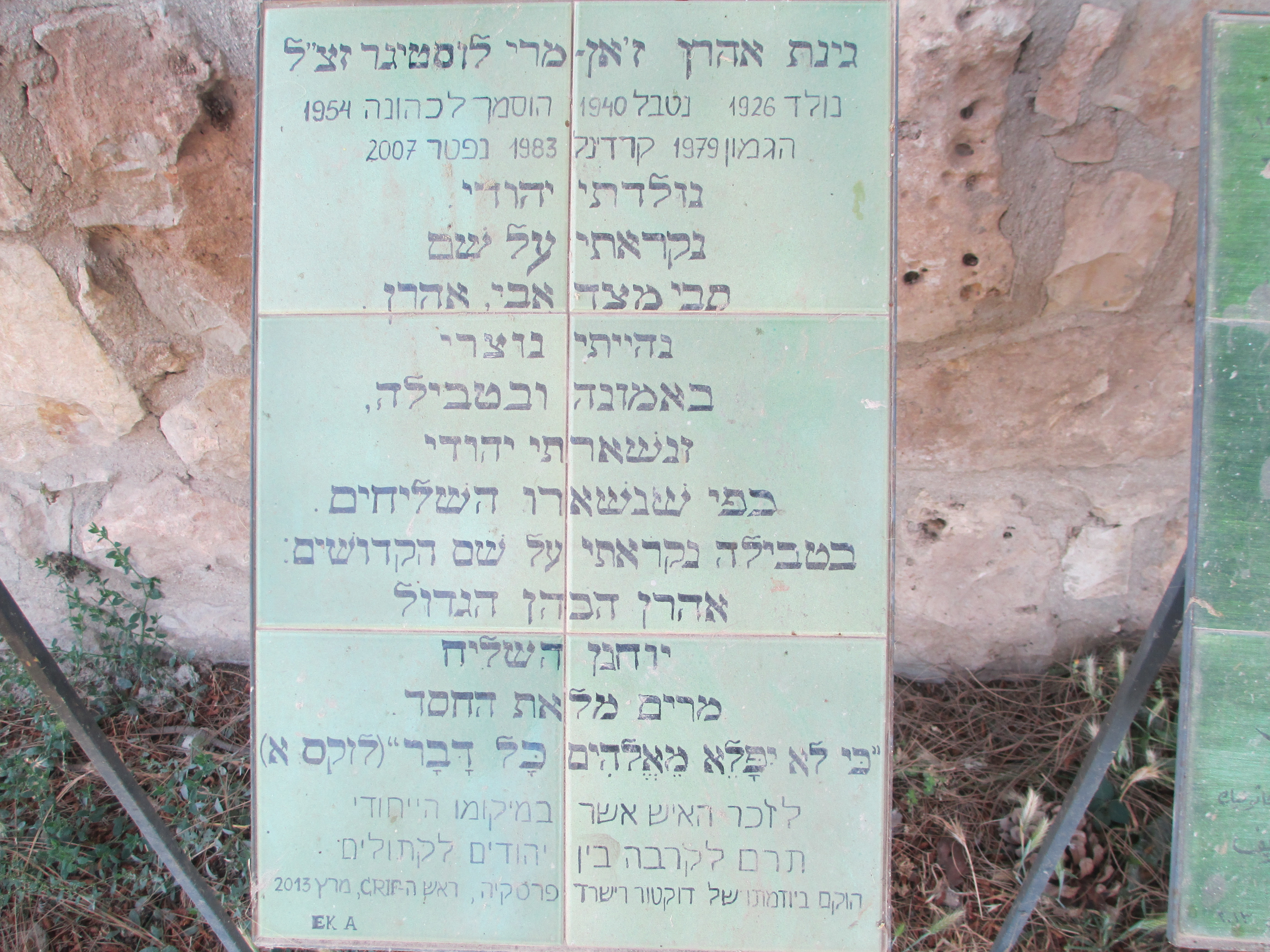 גינת זיכרון לקרדינל לוסטיגר במנזר הבנדיקטיני באבו גוש